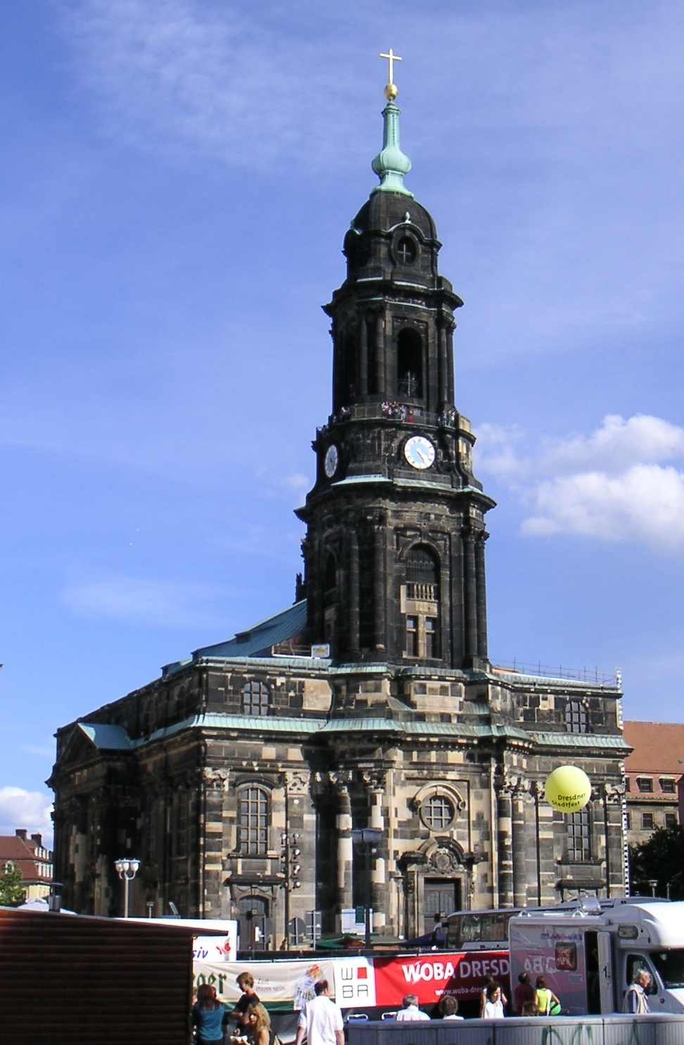 Dresden - Kreuzkirche vom Altmarkt her gesehen fotographiert am 22. 08. 2004 lizenziert unter GNU-FDL